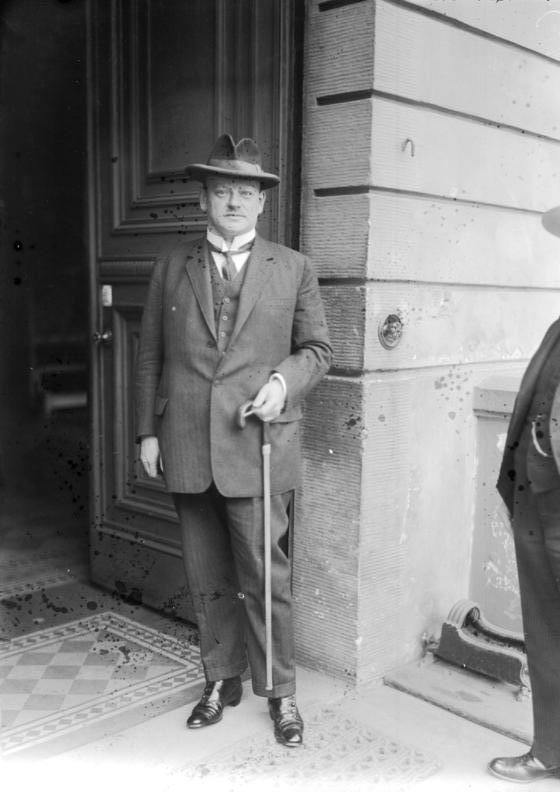 Zum Regierungswechsel in Deutschland. Reichskanzler Dr. Stresemann, Deutsche Volkspartei, welcher auch gleichzeitig das Aussenministerium übernommen hat. Neueste Aufnahme kurz nach seinem Regierungsantritt.